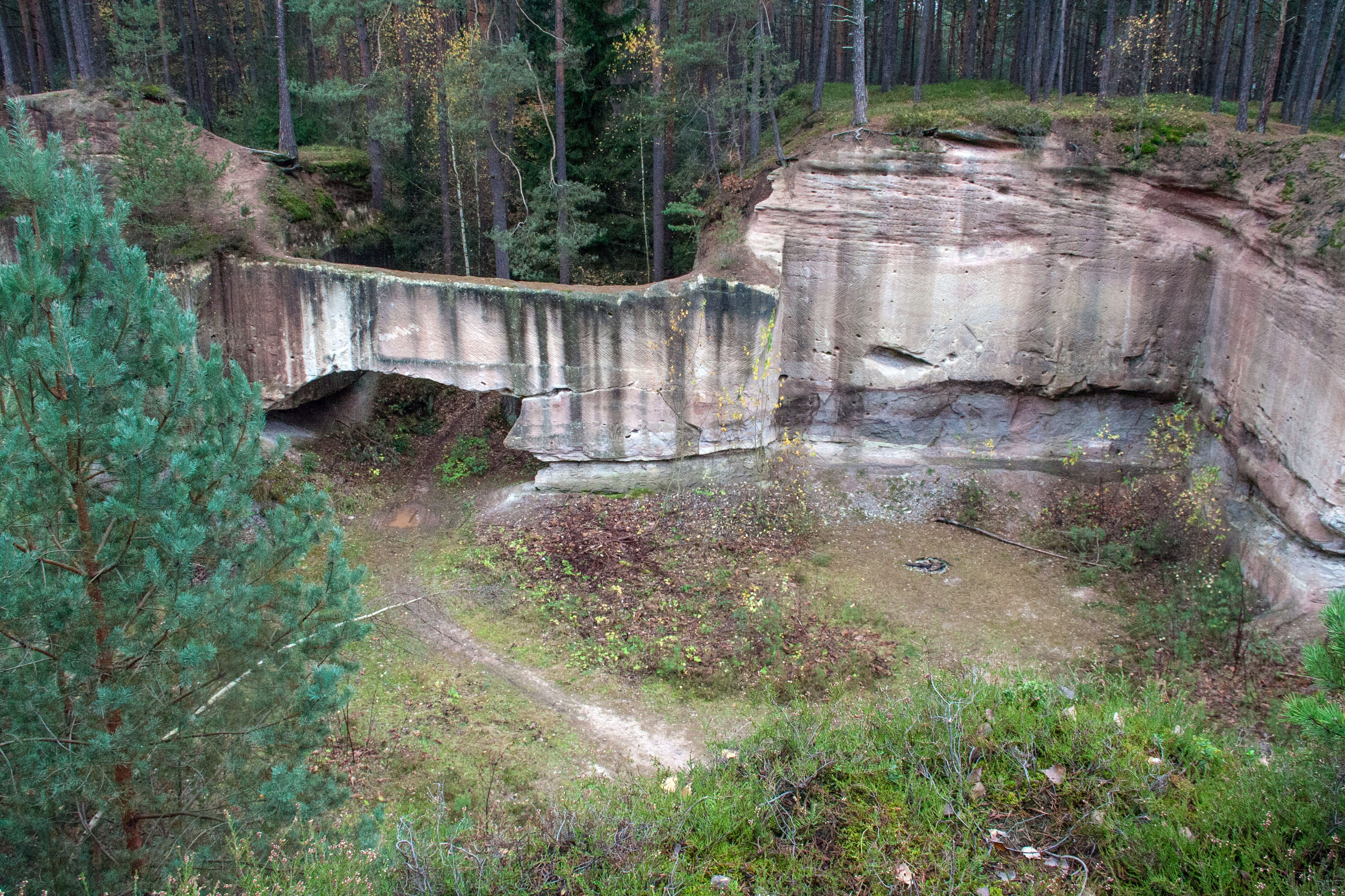 Historische Steinbrüche Wernsbach